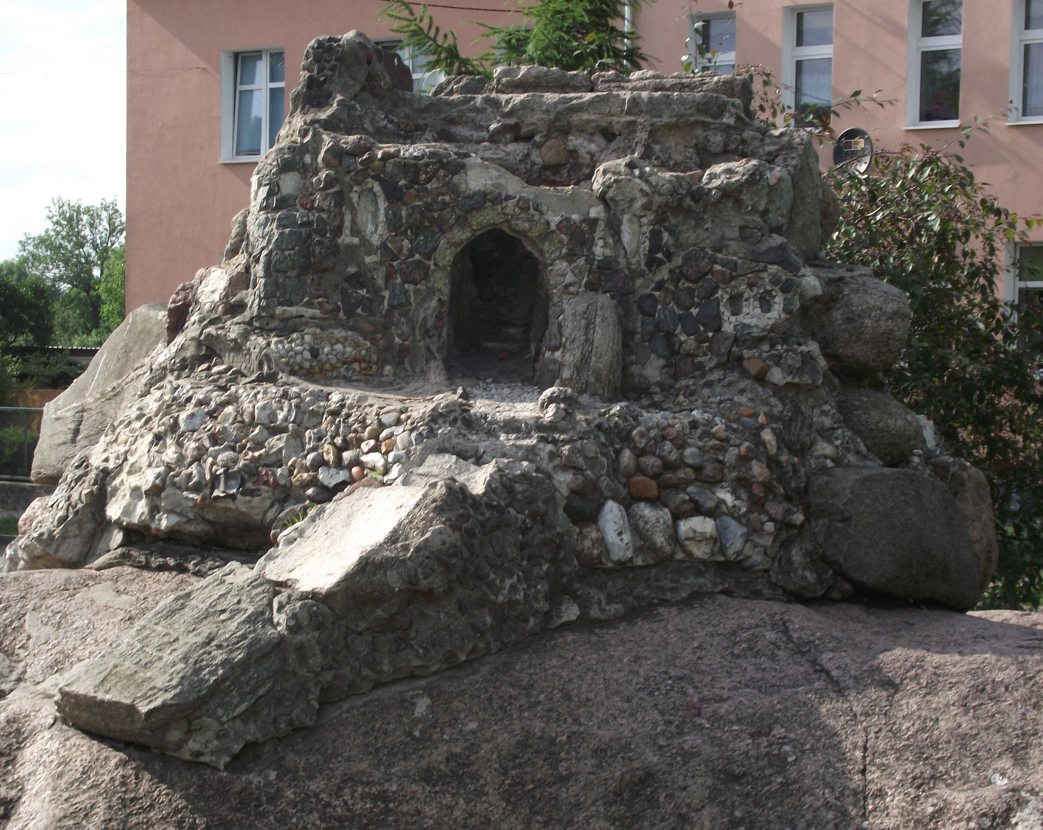 Miniatura zamku dobudowanego w latach 70. XX wieku na szczycie głazu narzutowego przy ulicy Wojska Polskiego w Sulechowie.